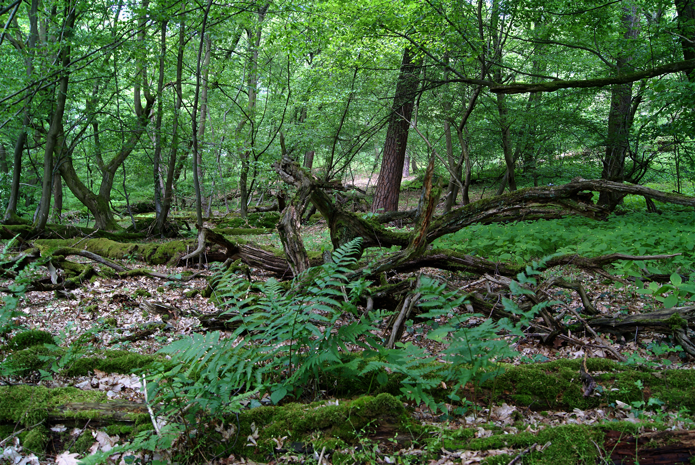 Wald im Naturschutzgebiet „Griesheimer Düne und Eichwäldchen“